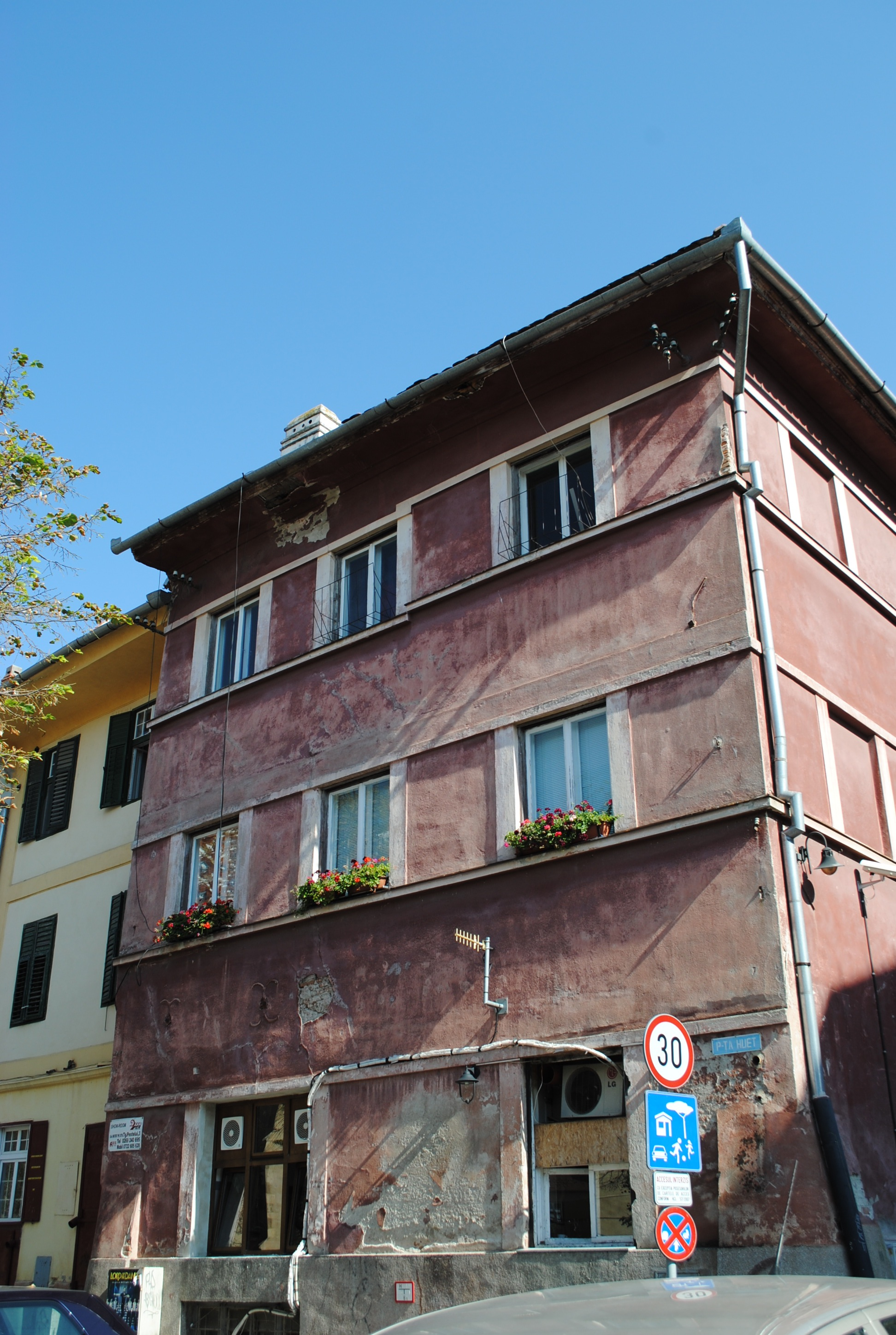 Casă, sf. sec. XV, sf. sec. XVIII, transf. sec. XX